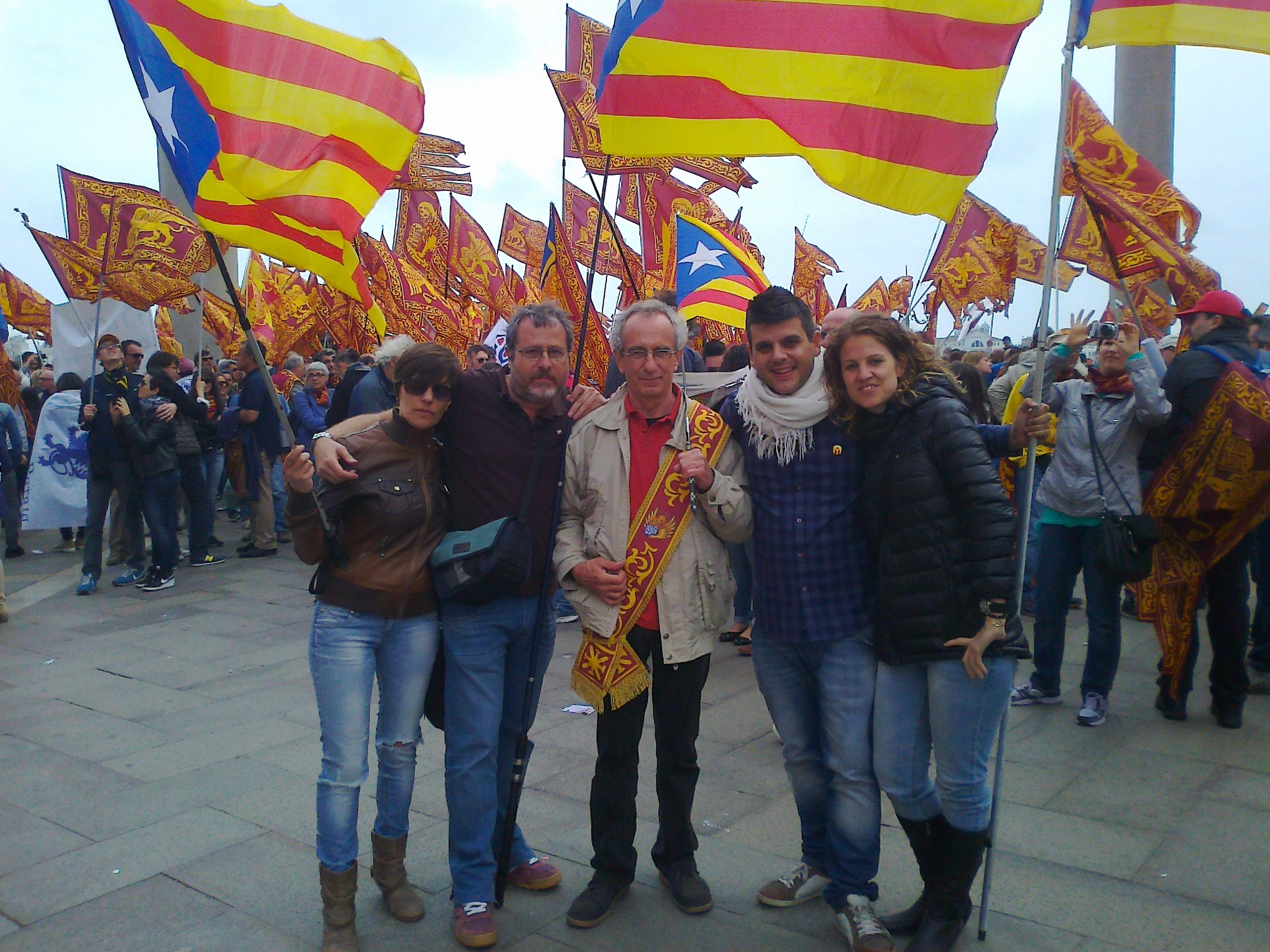 La delegació de UPDIC a Venècia. Al centre Jordi Fornas amb la banda de batlle honorari, a la seva dreta Josep. M. Roselló (Secretari Gral.) i a la seva esquerra Cristian Molina (actual tresorer) acompanyats de les seves mullers.